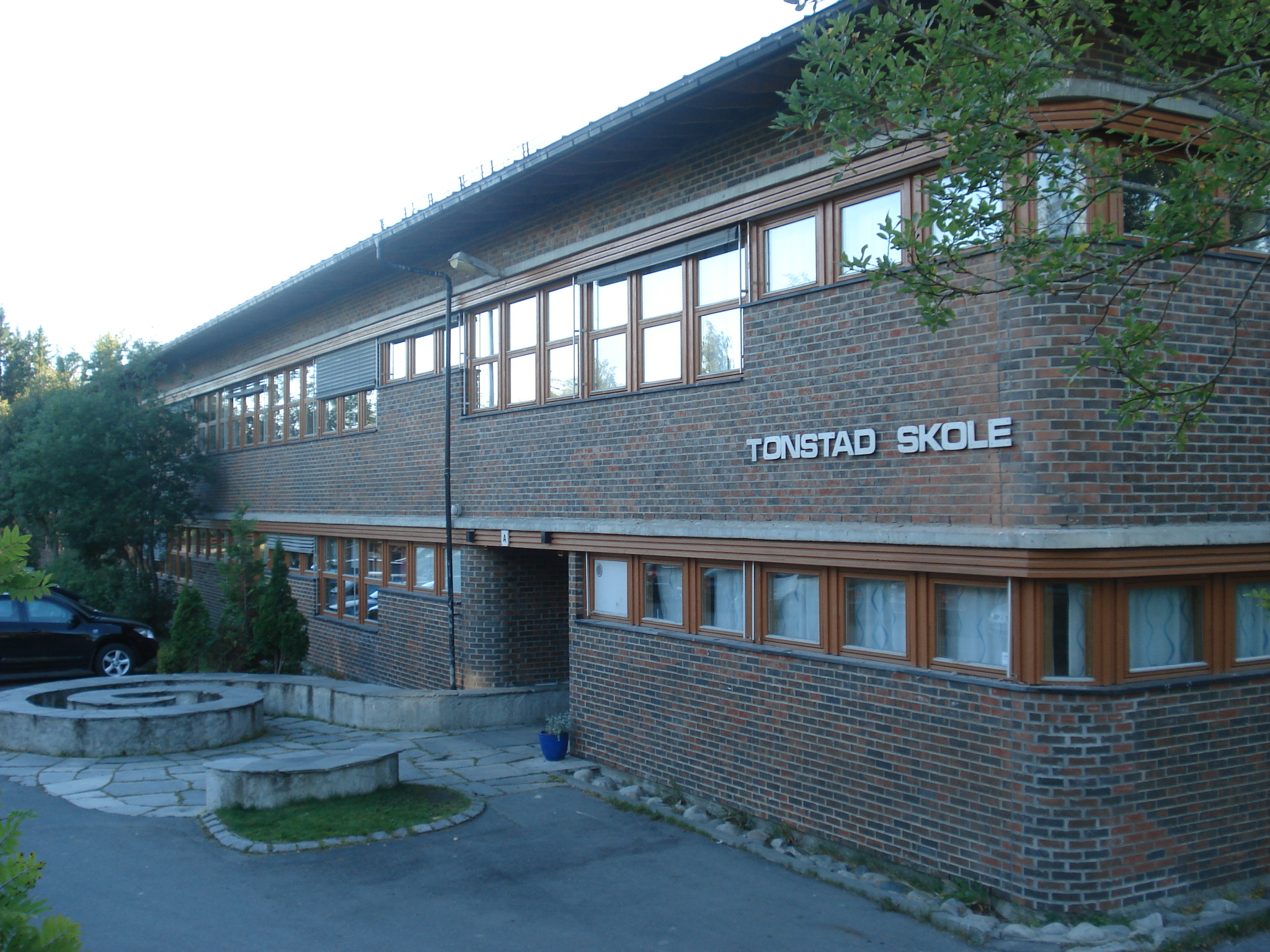 Tonstad skole